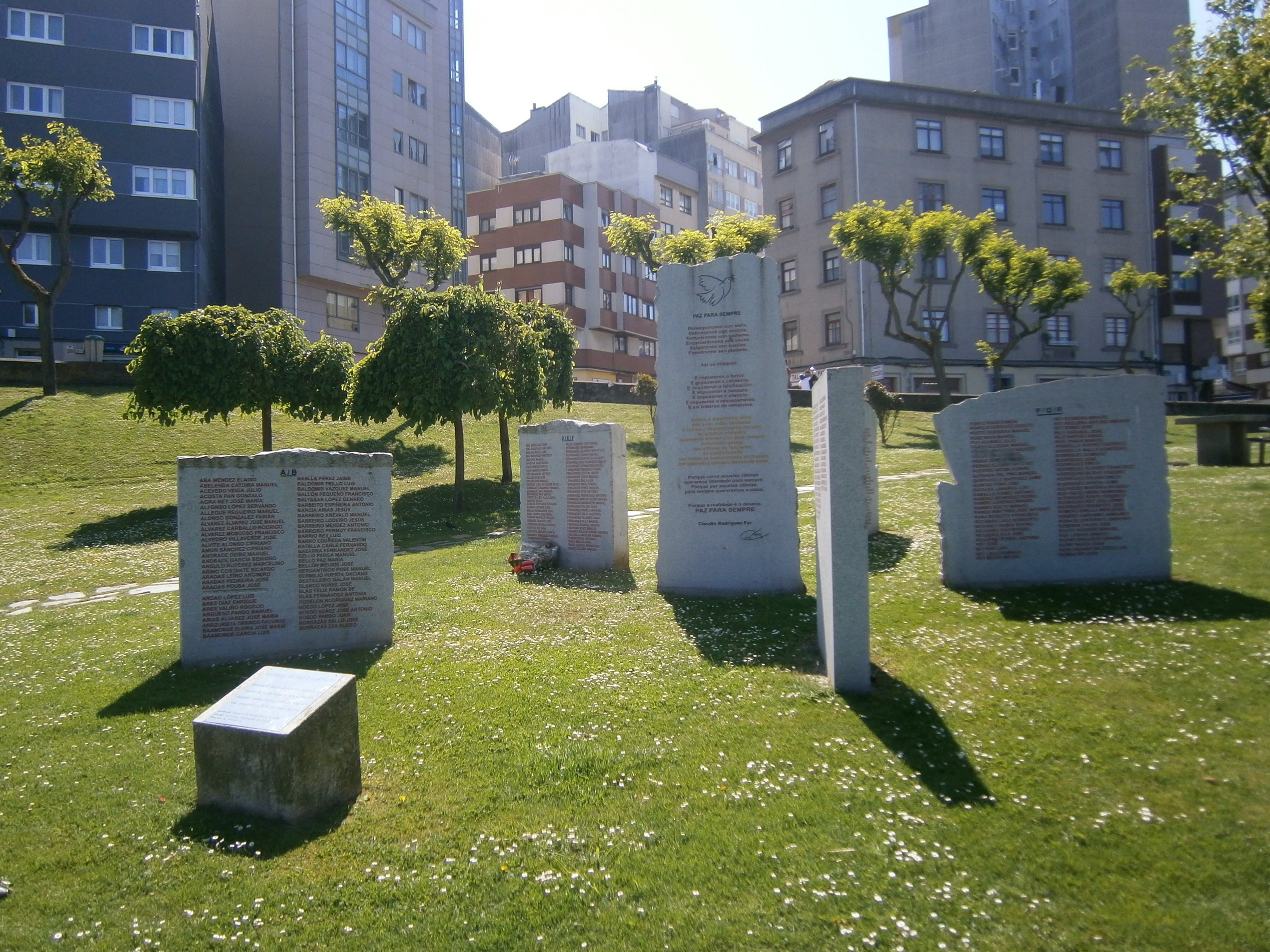 Monumento aos represaliados polo franquismo na comarca da Coruña